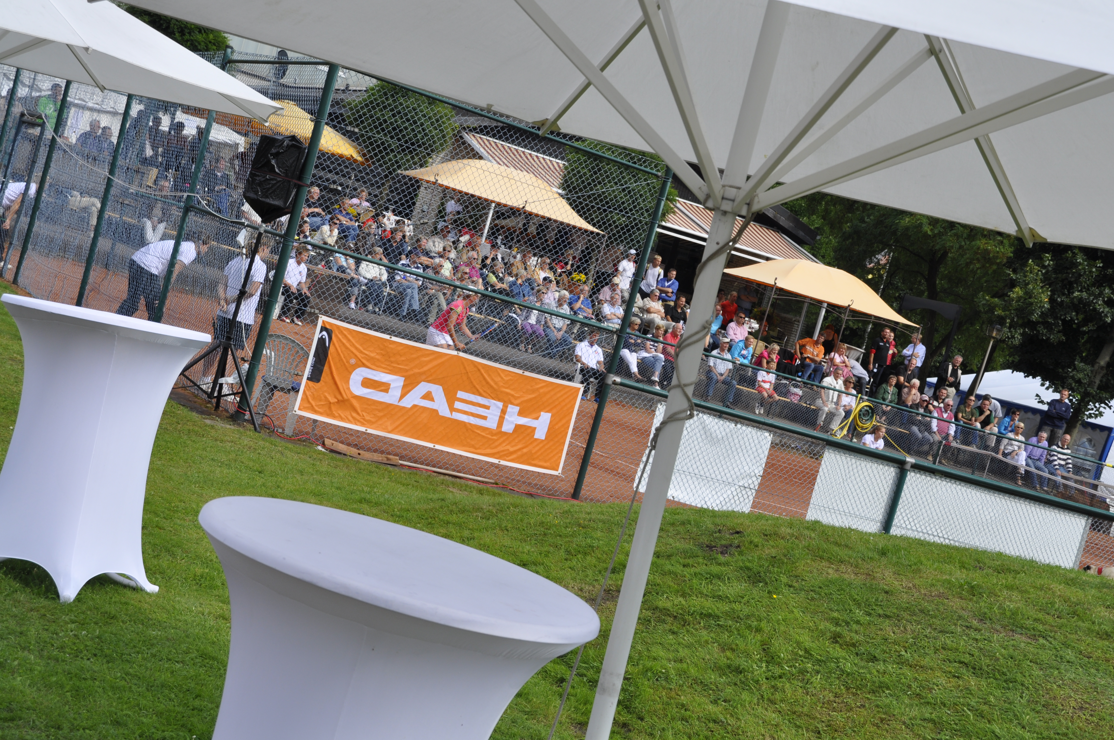 Blick auf den Centre Court Tennis Horst Schröder Pokal 2011